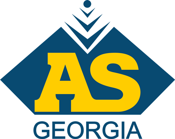 კომპანია „ას ჯორჯიას“ ლოგო